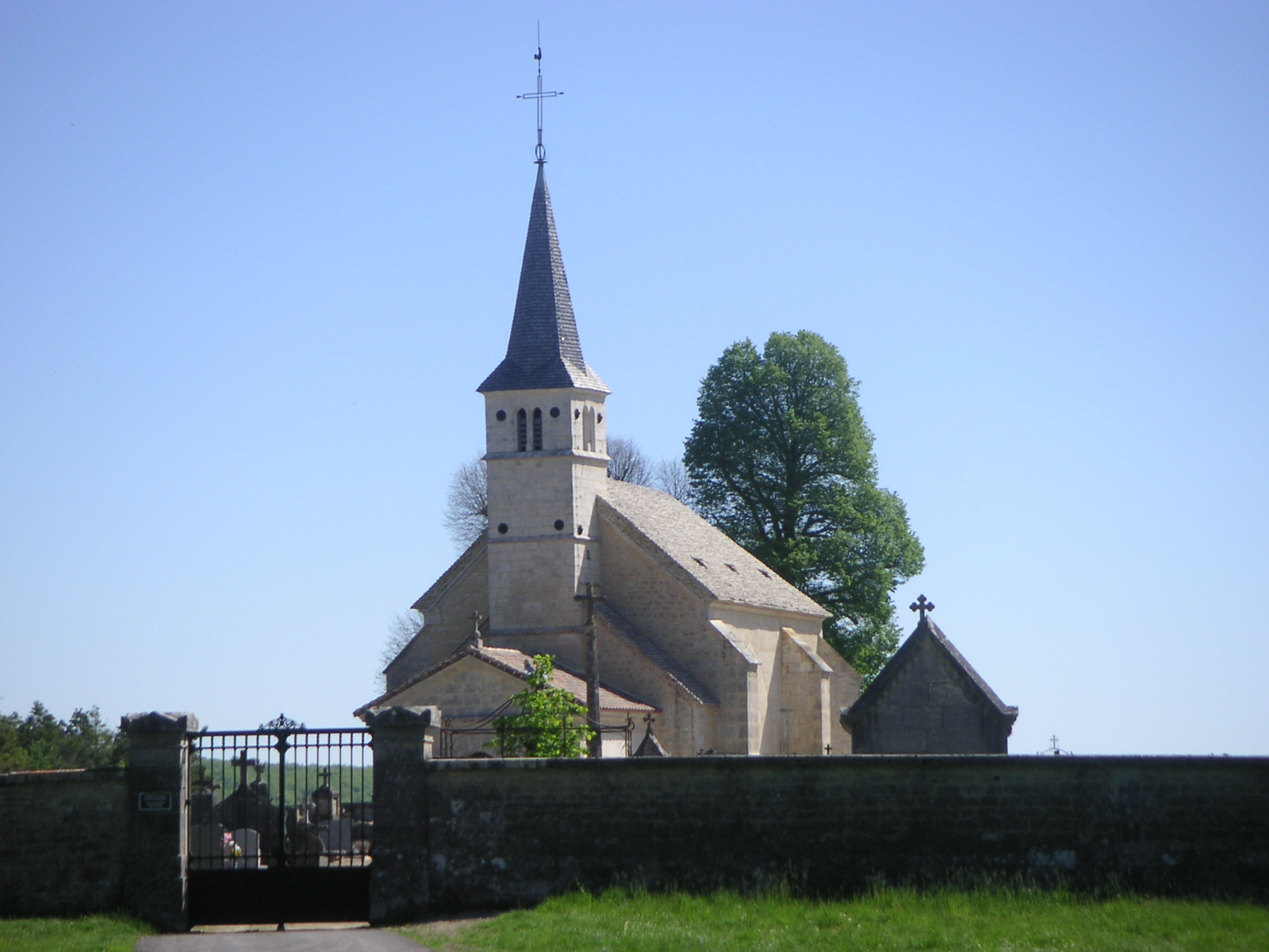 Chapelle Saint-Phal à Vanvey-sur-Ource (21)